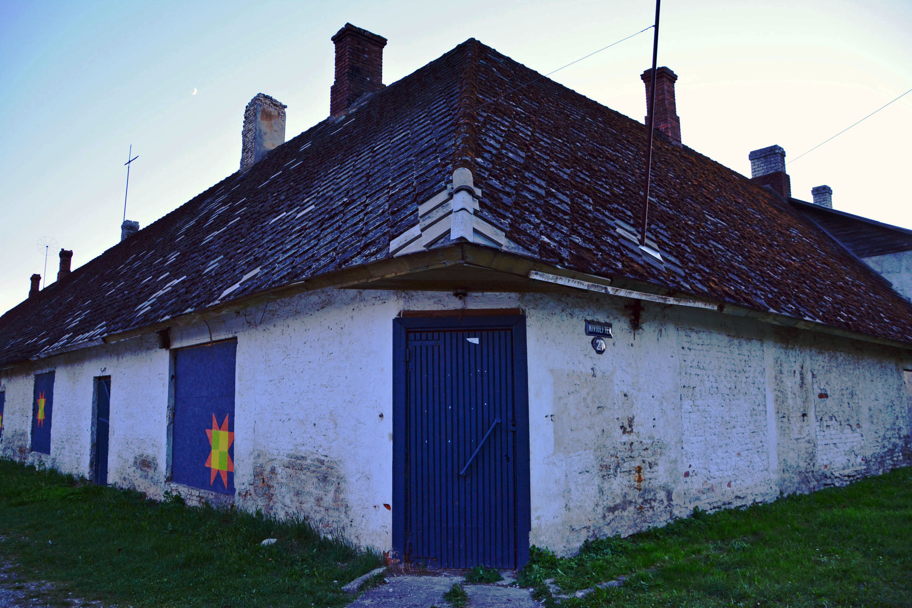 Püssi mõisa karjakastell, 19.saj.